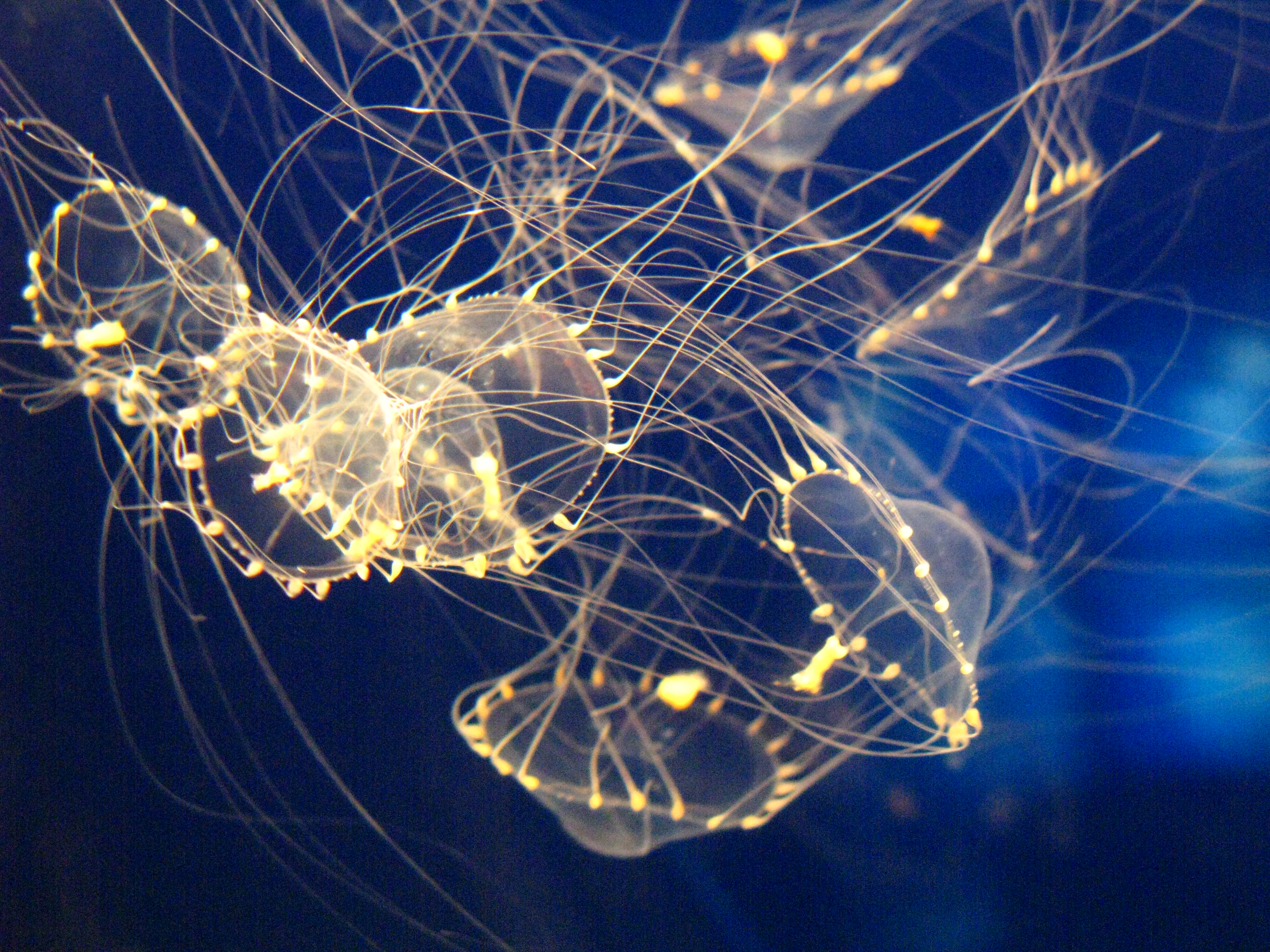 Scientific name Tima formosa